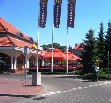 একটি ম্যাকডোনাল্ড’স রেস্তোরাঁ'র বহিরাঙ্গ, ভারসাভা, পোল্যাণ্ড, ২০০৮।